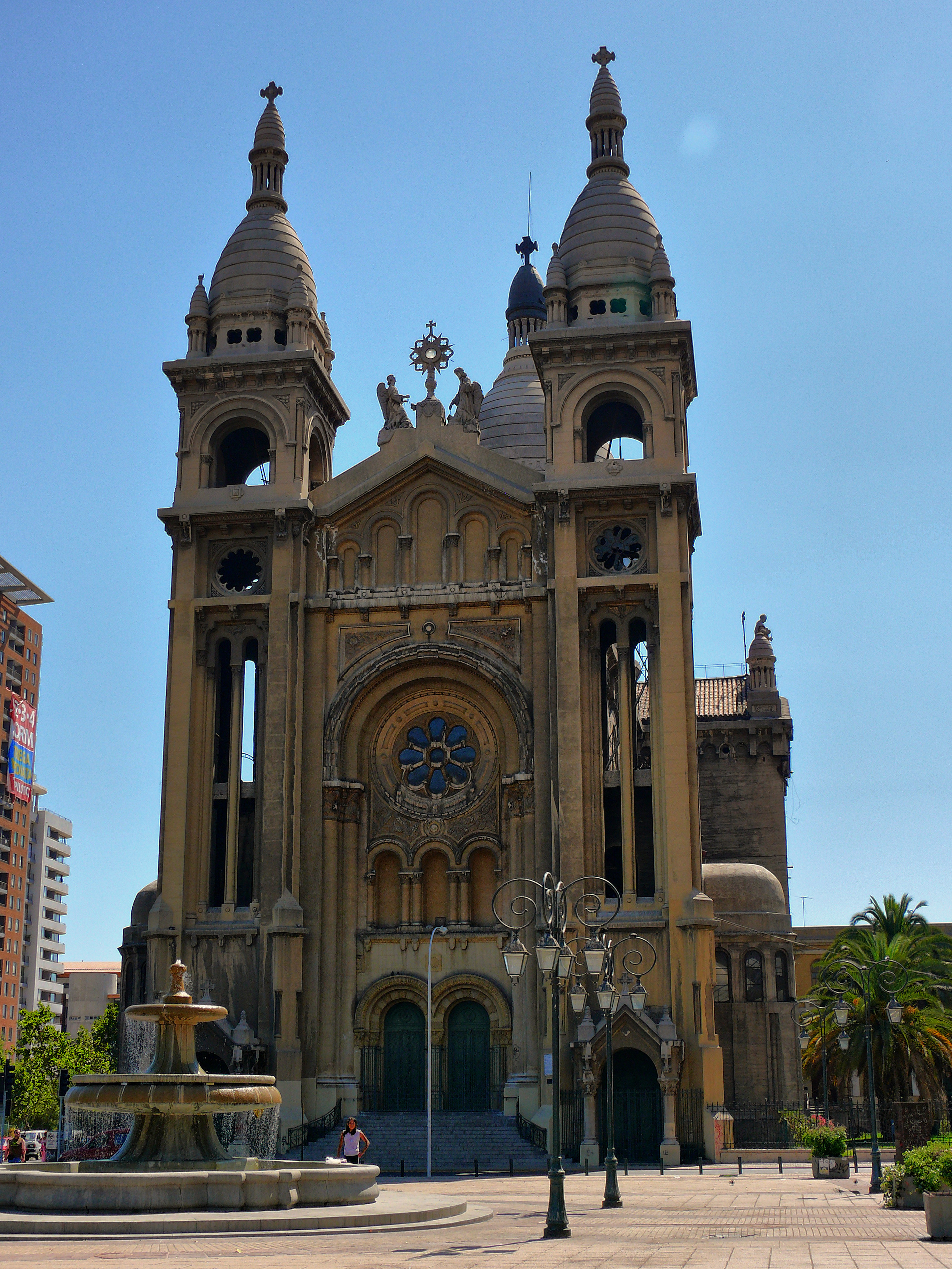 Vista de la Basílica de Los Sacramentinos This is a photo of a national monument in Chile: 880